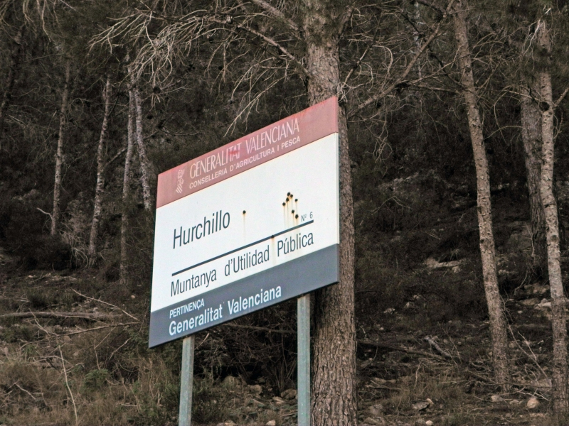 Monte de utilidad pública